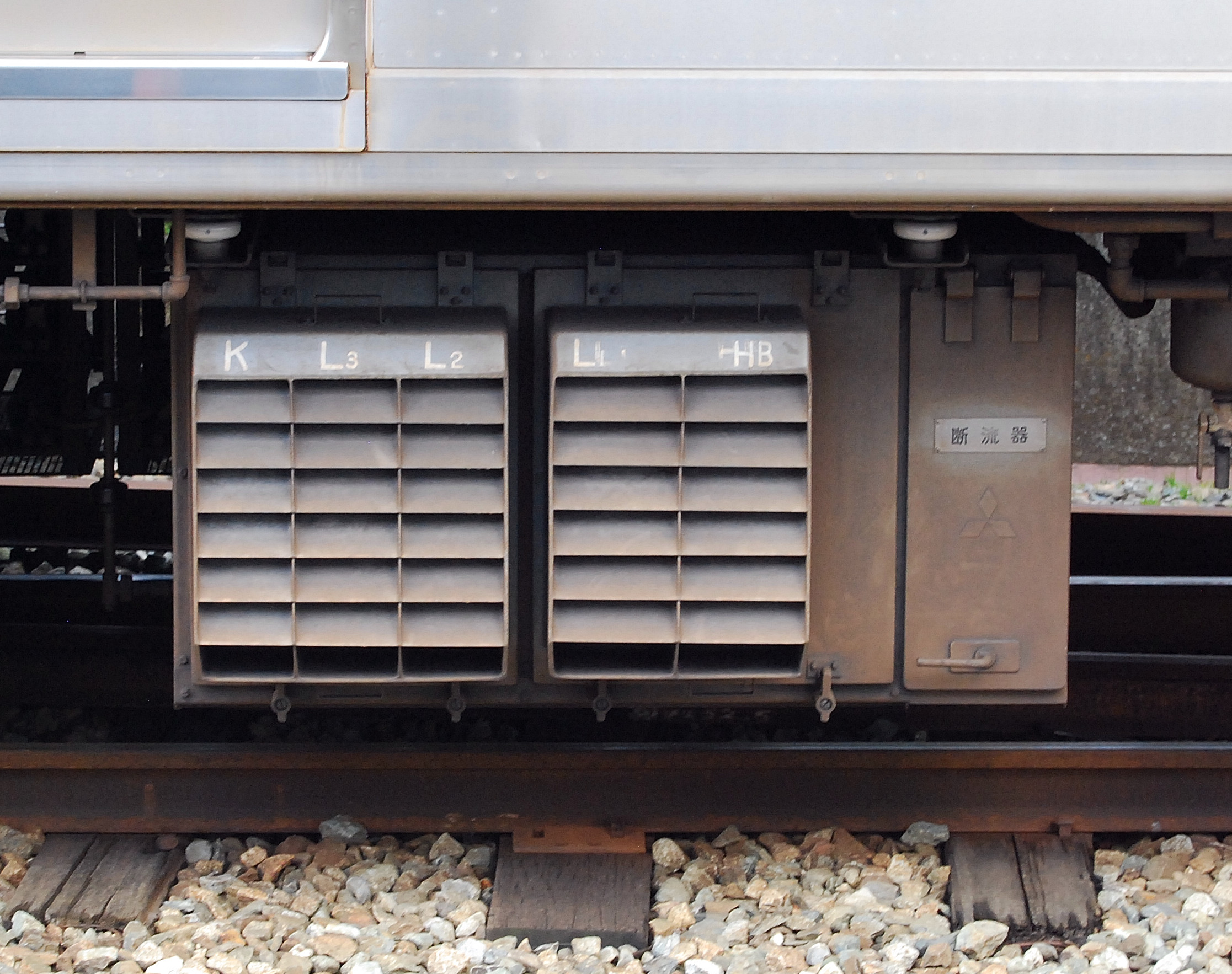 伊豆箱根鉄道5000系の床下に設置された断流器（ホームから撮影）